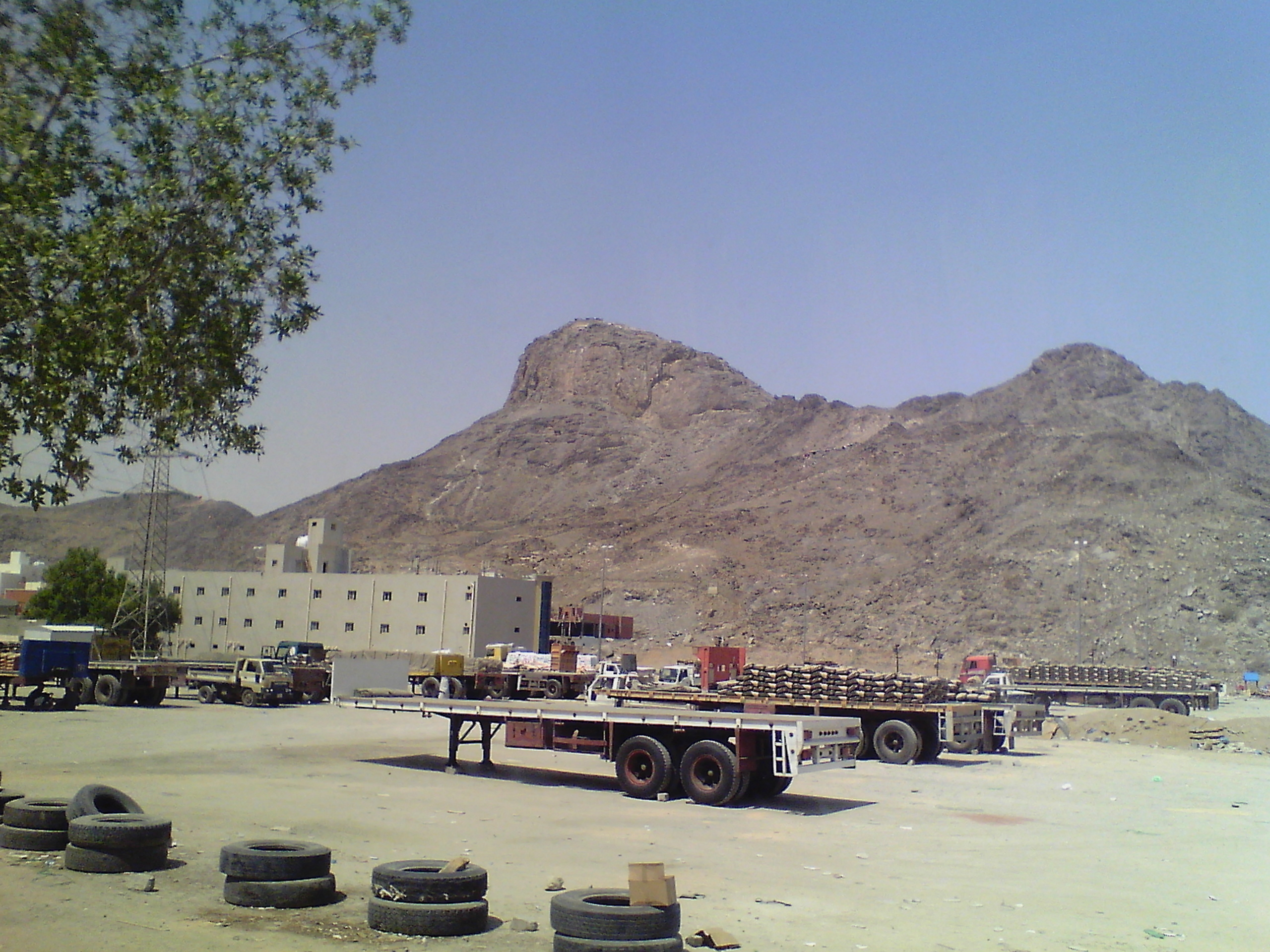 وہ پہاڑی جس میں غار حرا واقع ہے۔